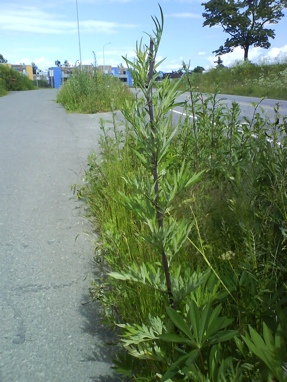 Artemisia vulgaris